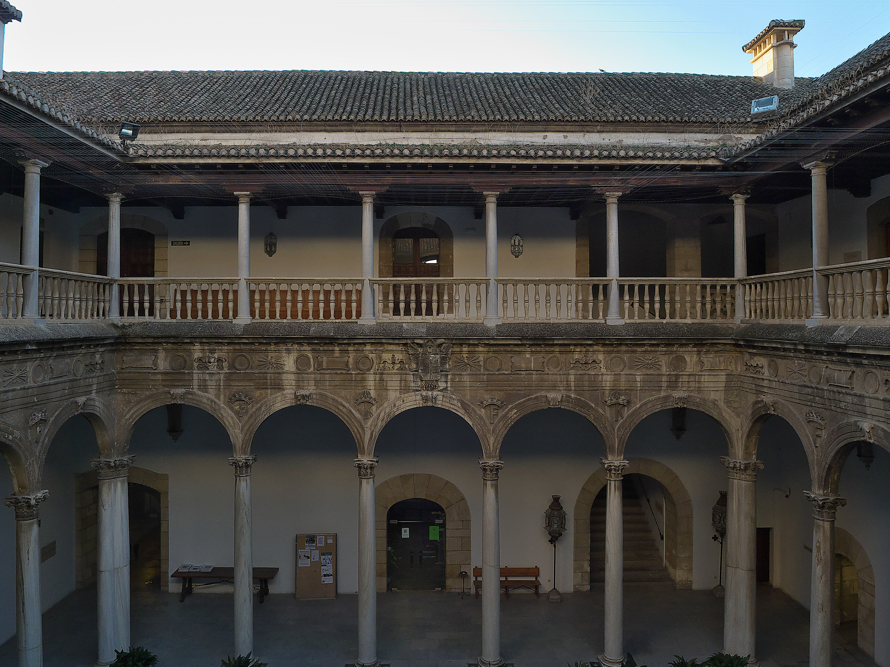 Carlos I de España (1522) finaliza el proyecto de sus abuelos.